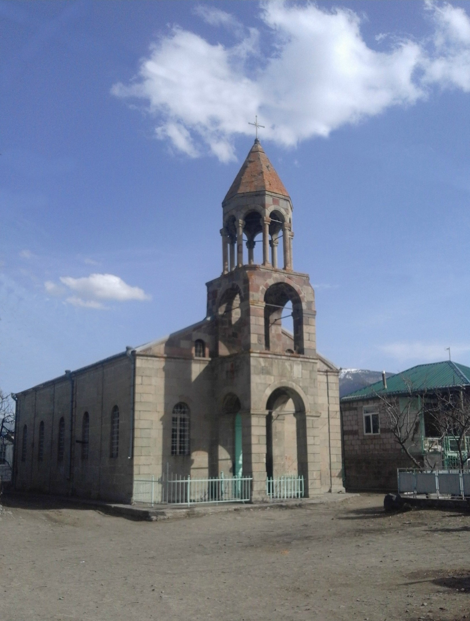 Սուրբ Խաչ (2019թ․)